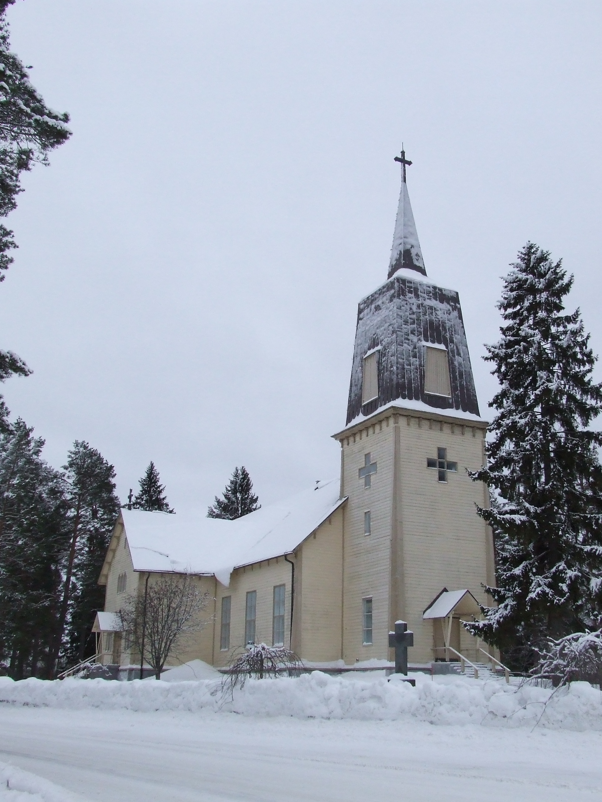 Polvijärven kirkko